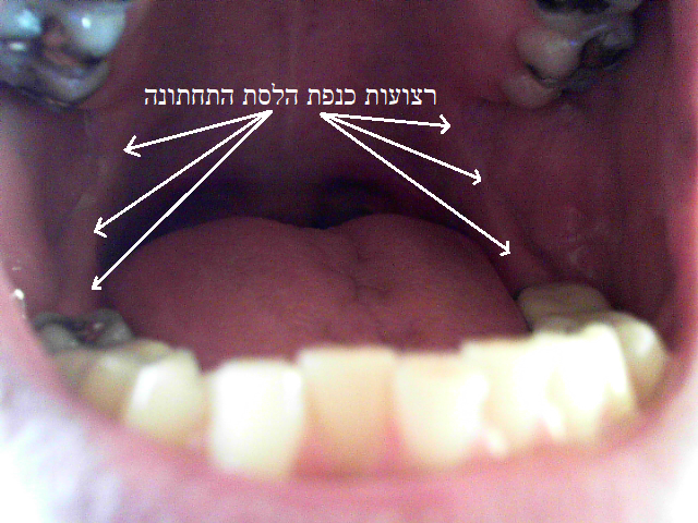 פה אנושי פתוח. רצועות כנפת הלסת התחתונה מסומנות בחצים לבנים. שימו לב שנעקרו שתי שיני הבינה התחתונות, ולכן מסלול והיאחזות רצועות כנפת הלסת התחתונה מעט שונות.